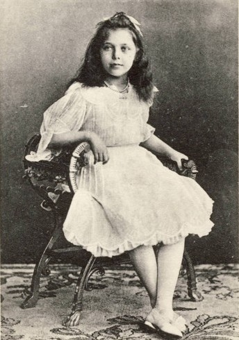 Princesa Isabel de Hesse